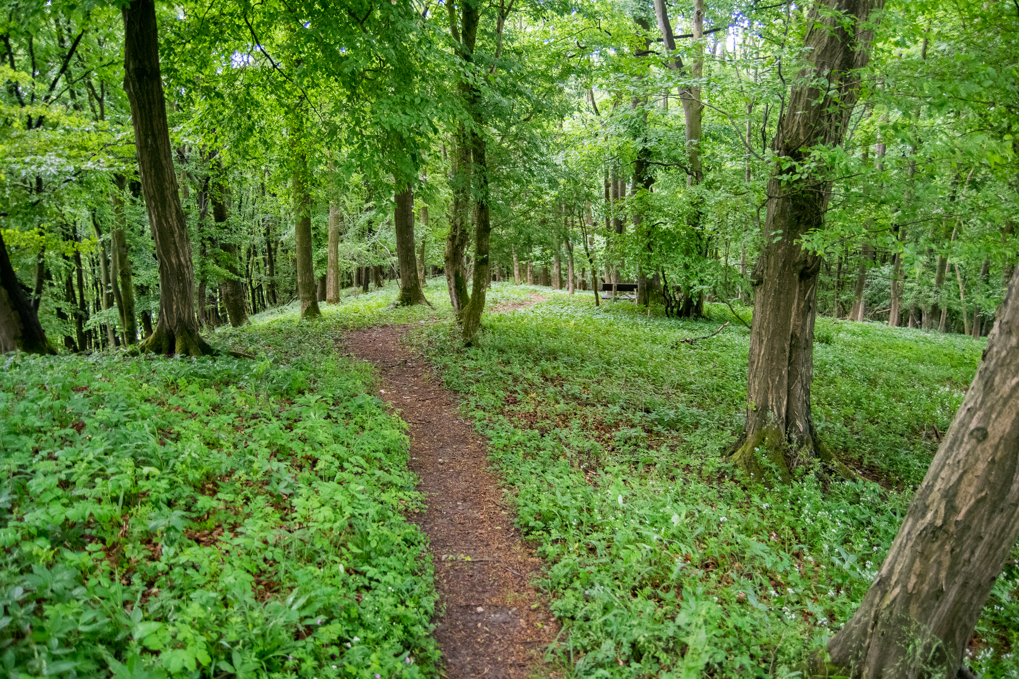 Naturschutzgebiet Teimer am gleichnamigen Berg, Kalletal, Kreis Lippe